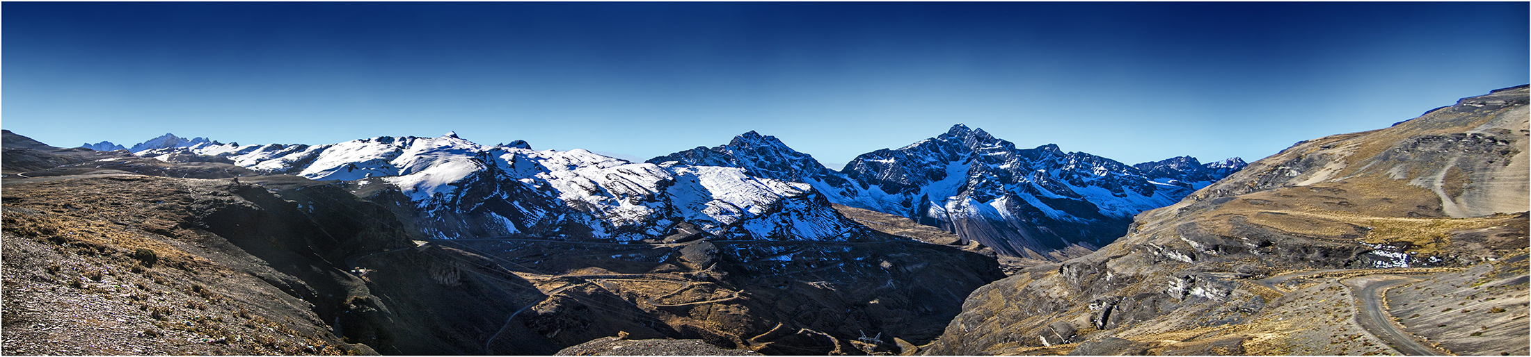 Punto estratégico de viaje en la ruta a los Yungas.